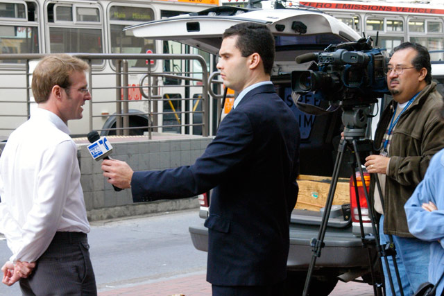 Image:Interview.jpg interview